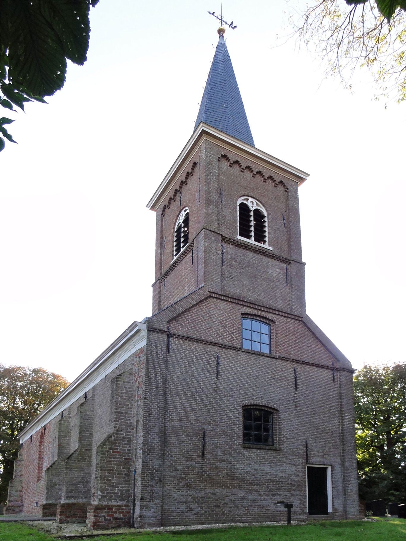 Kerk van Brantgum, rijksmonument